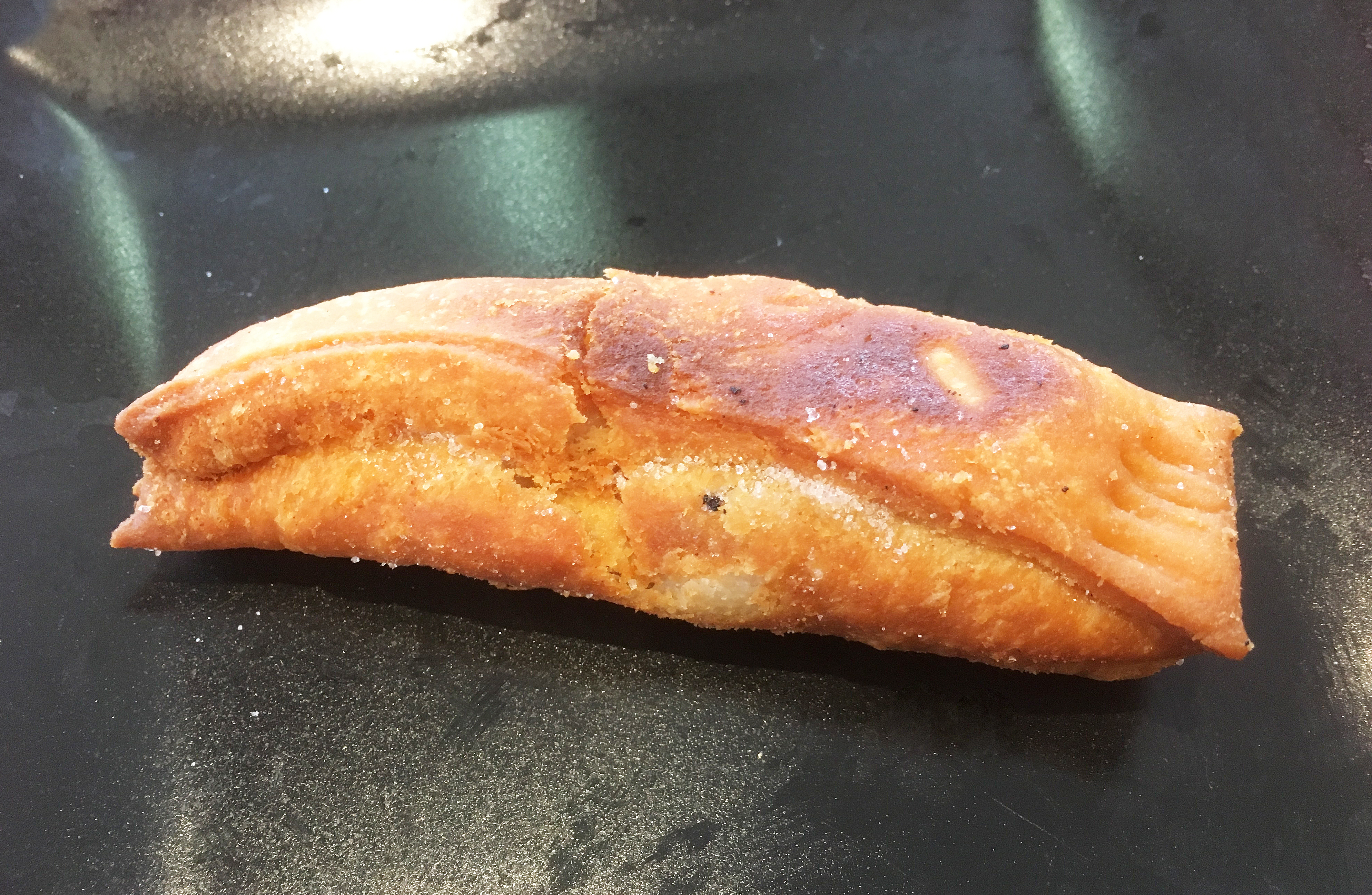 Quesadiella, Repostería, Postres